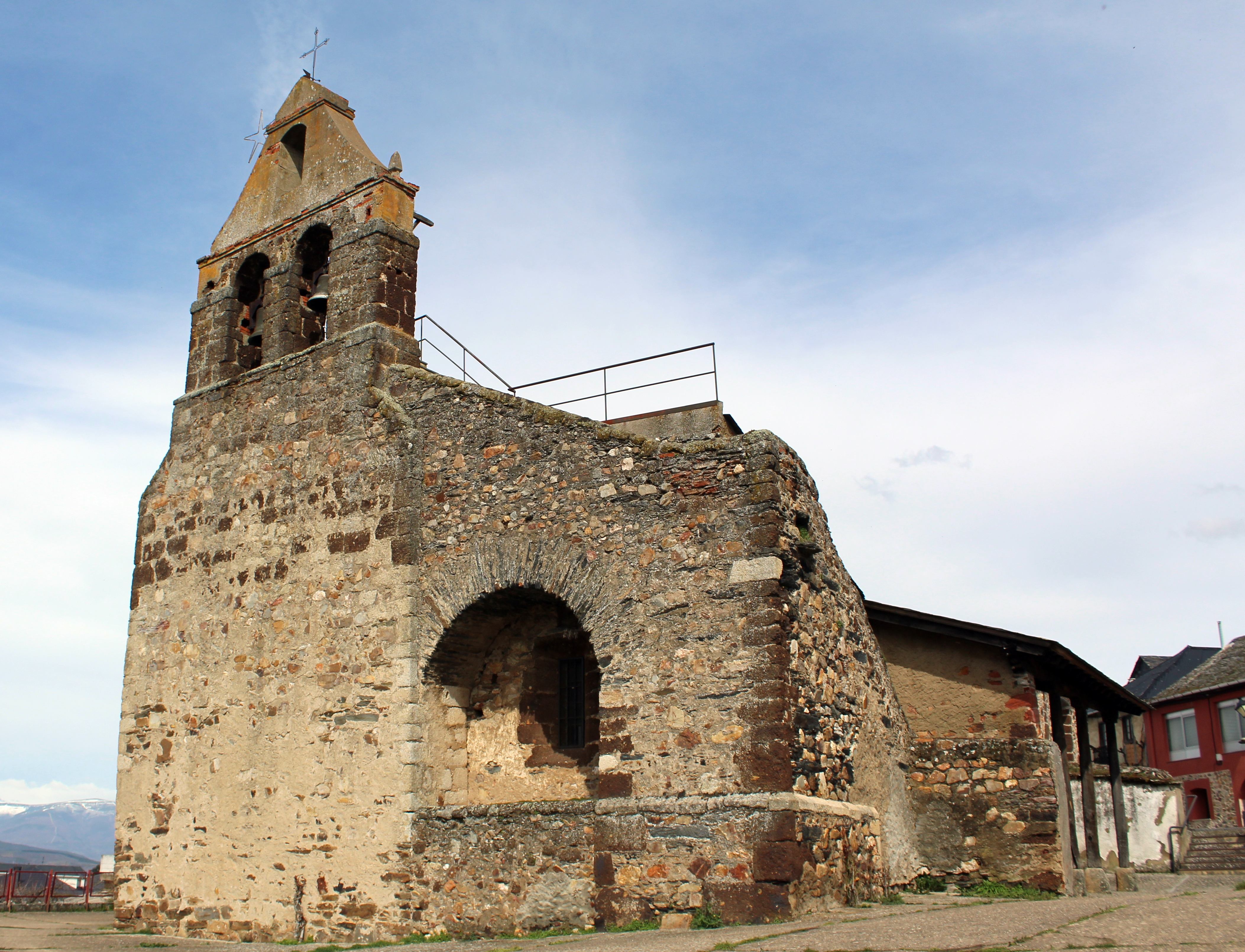 Iglesia de Santa Colomba en Castropodame, provincia de León, comarca de El Bierzo.